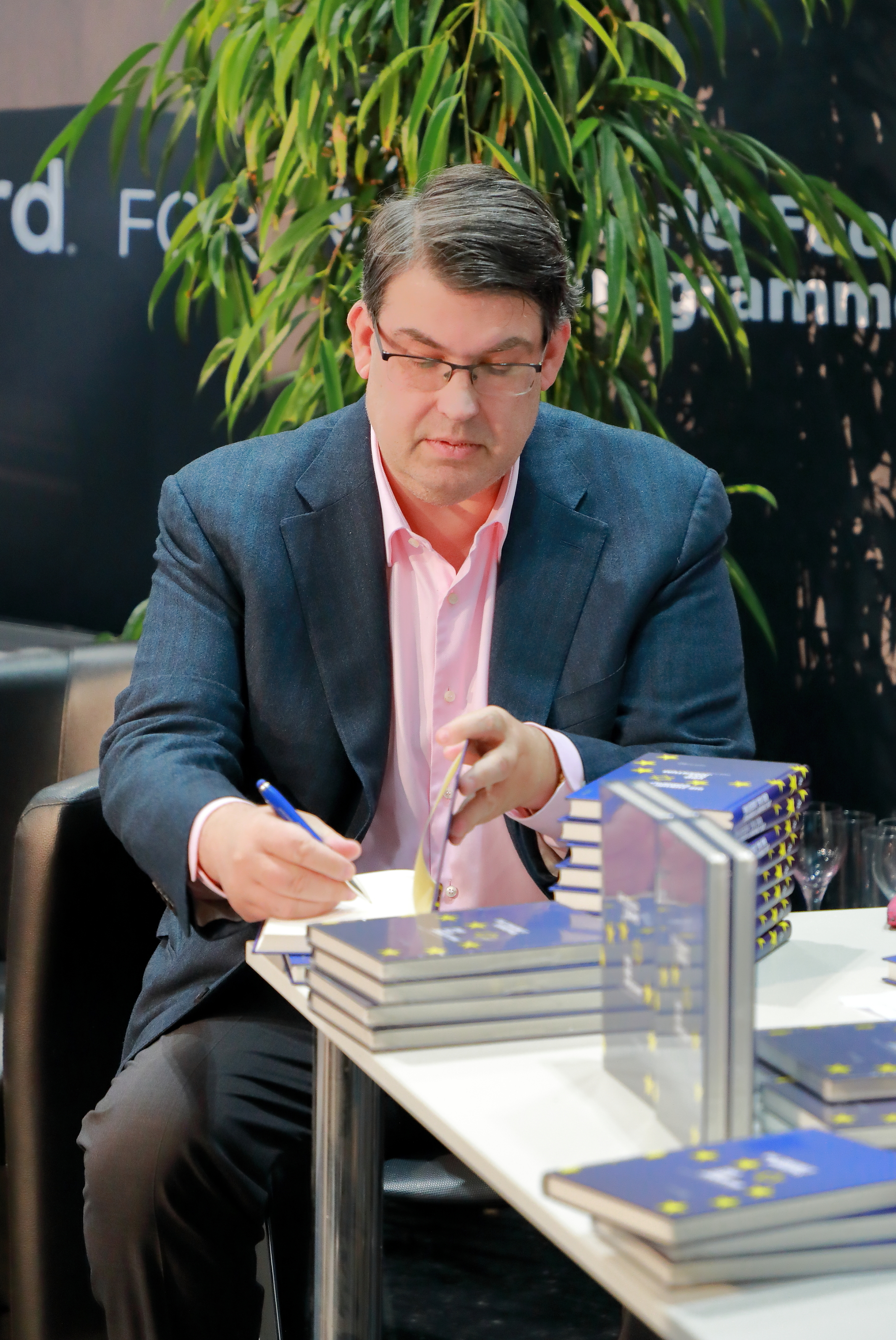 Der Unternehmer und Präsident der Israelitischen Kultusgemeinde Oskar Deutsch bei der Signierung seines neuen Buches Die Zukunft Europas und das Judentum auf der Wiener Buchmesse 2017.